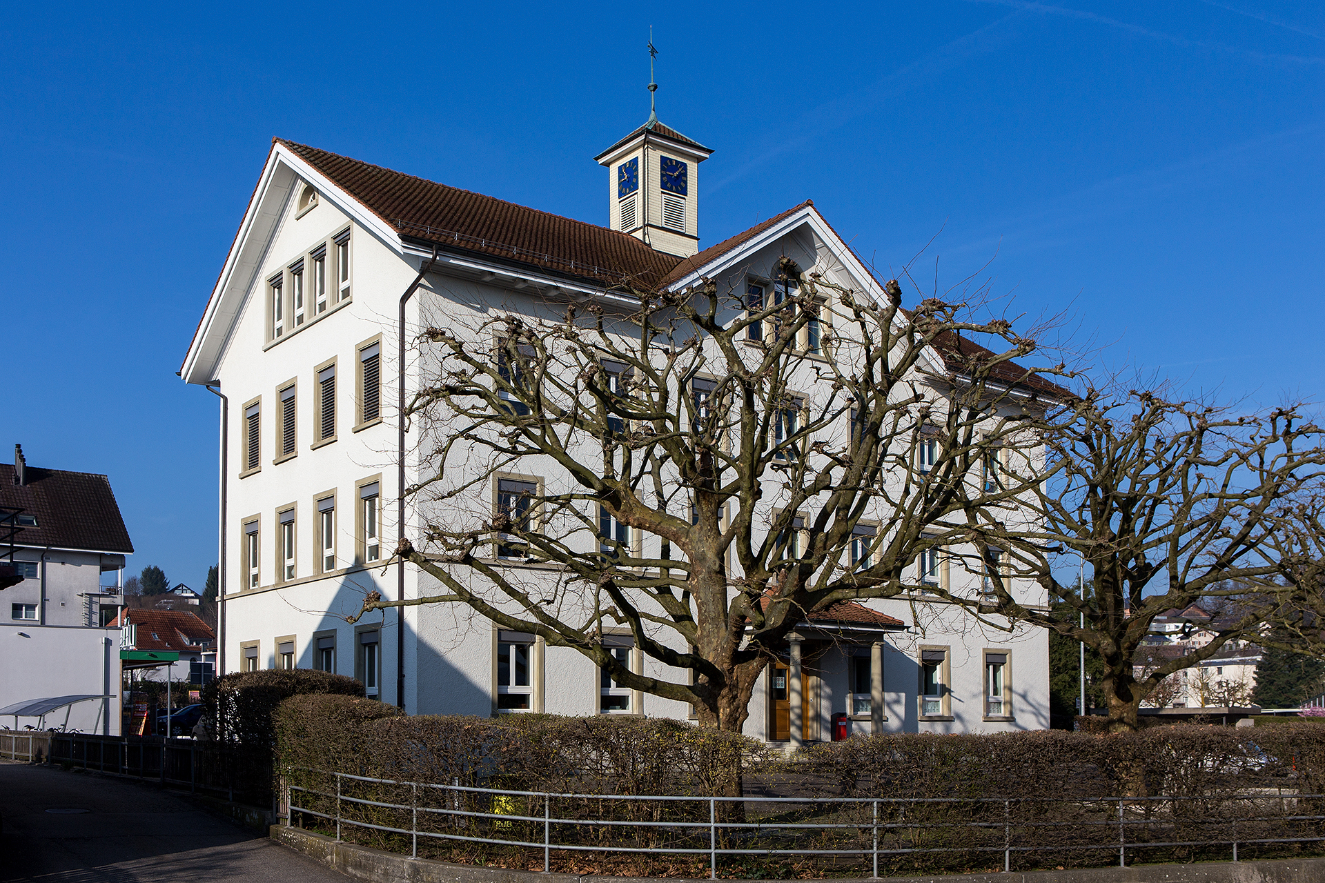 Kreuzplatz-Schulhaus (1874) in Strengelbach (AG)